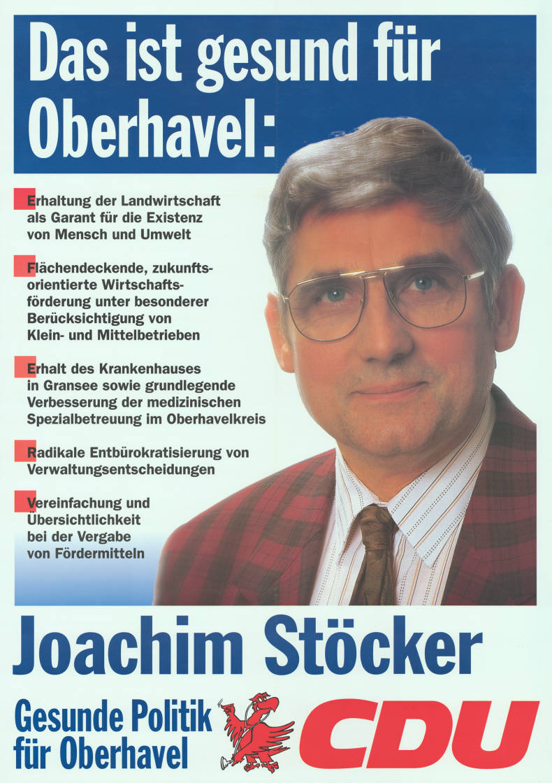 Das ist gesund für Oberhavel: . Erhaltung der Landwirtschaft als Garant für die Existenz von Mensch und Umwelt . Flächendeckende, zukunftsorientierte Wirtschaftsförderung ... . Erhalt des Krankenhauses in Gransee ... . Radikale Entbürokratisierung von Verwaltungsentscheiden . Vereinfachung und Übersichtlichkeit bei der Vergabe von Fördermitteln Joachim Stöcker Gesunde Politik für Oberhavel CDU Abbildung: Porträtfoto Plakatart: Kandidaten-/Personenplakat mit Porträt Objekt-Signatur: 10-033 : 206 Bestand: Landtagswahlplakate Brandenburg (10-033) GliederungBestand10-18: Landtagswahlplakate Brandenburg (10-033) » CDU Lizenz: KAS/ACDP 10-033 : 206 CC-BY-SA 3.0 DE